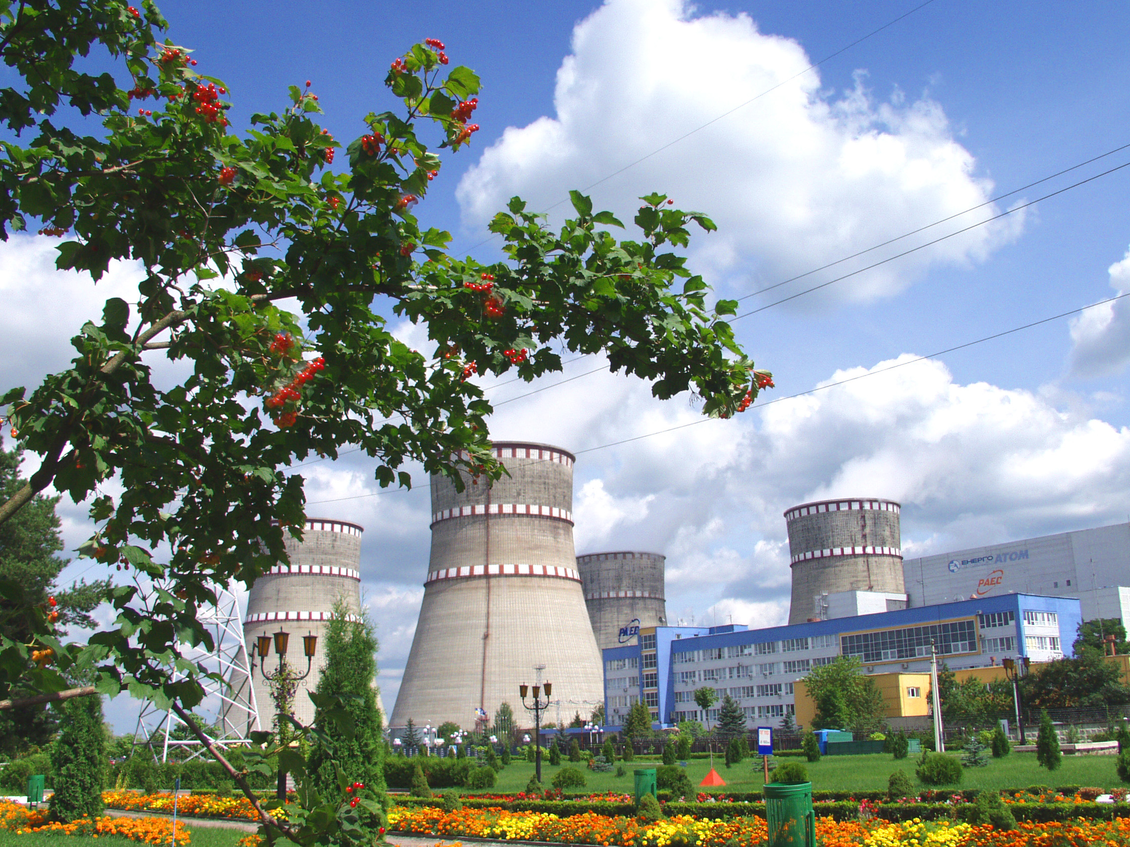 Ровенская АЭС летом 2006 года. Украина.